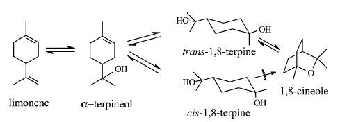 Bildning av Cineole från Limonene.